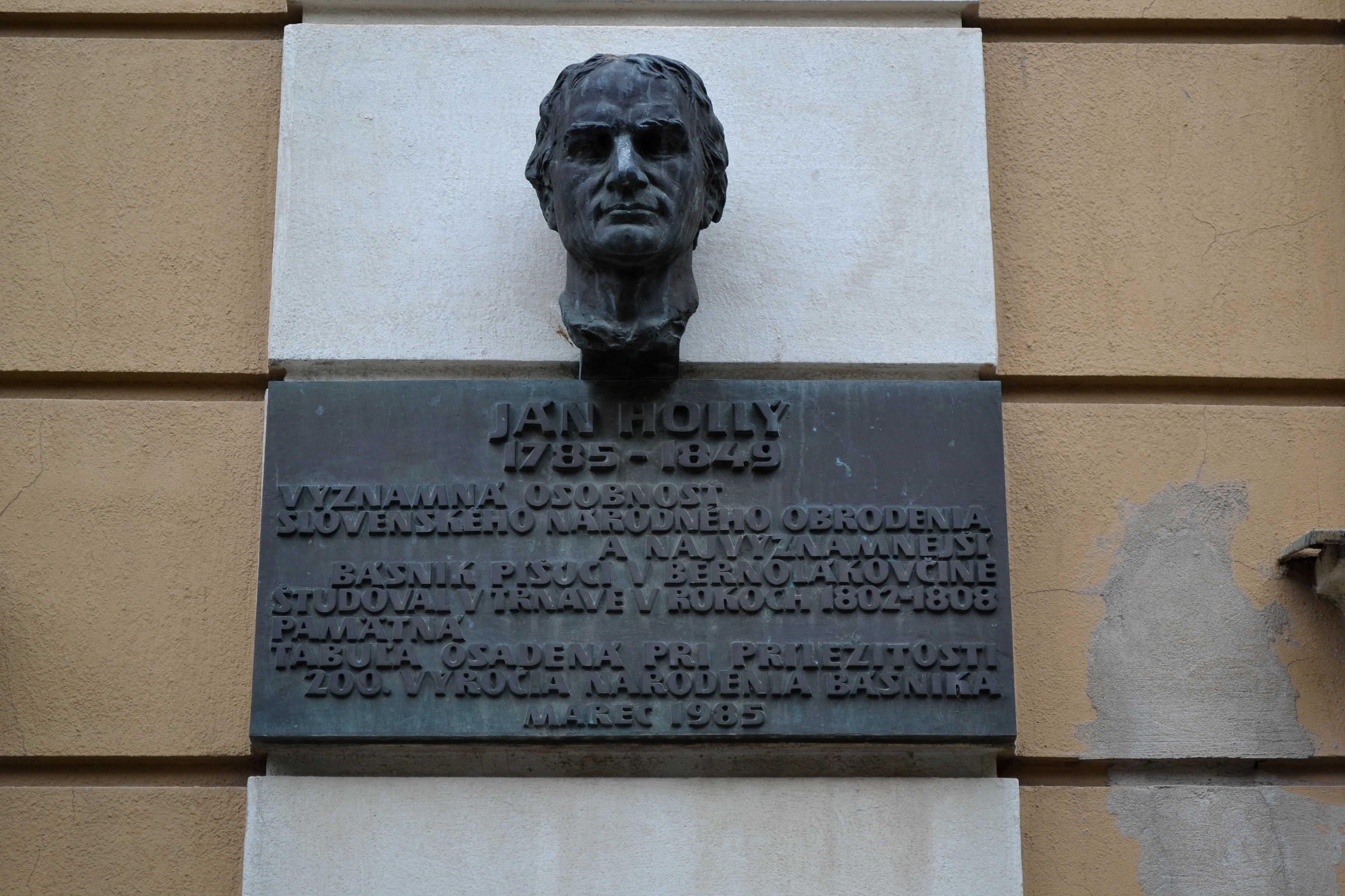 Trnava, komplex univerzitných budov; budova Generálneho seminára; busta Jána Hollého